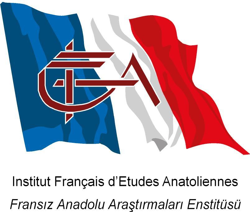 Logo Institut Français d'études Anatoliennes (IFEA) à Istanbul, Turquie